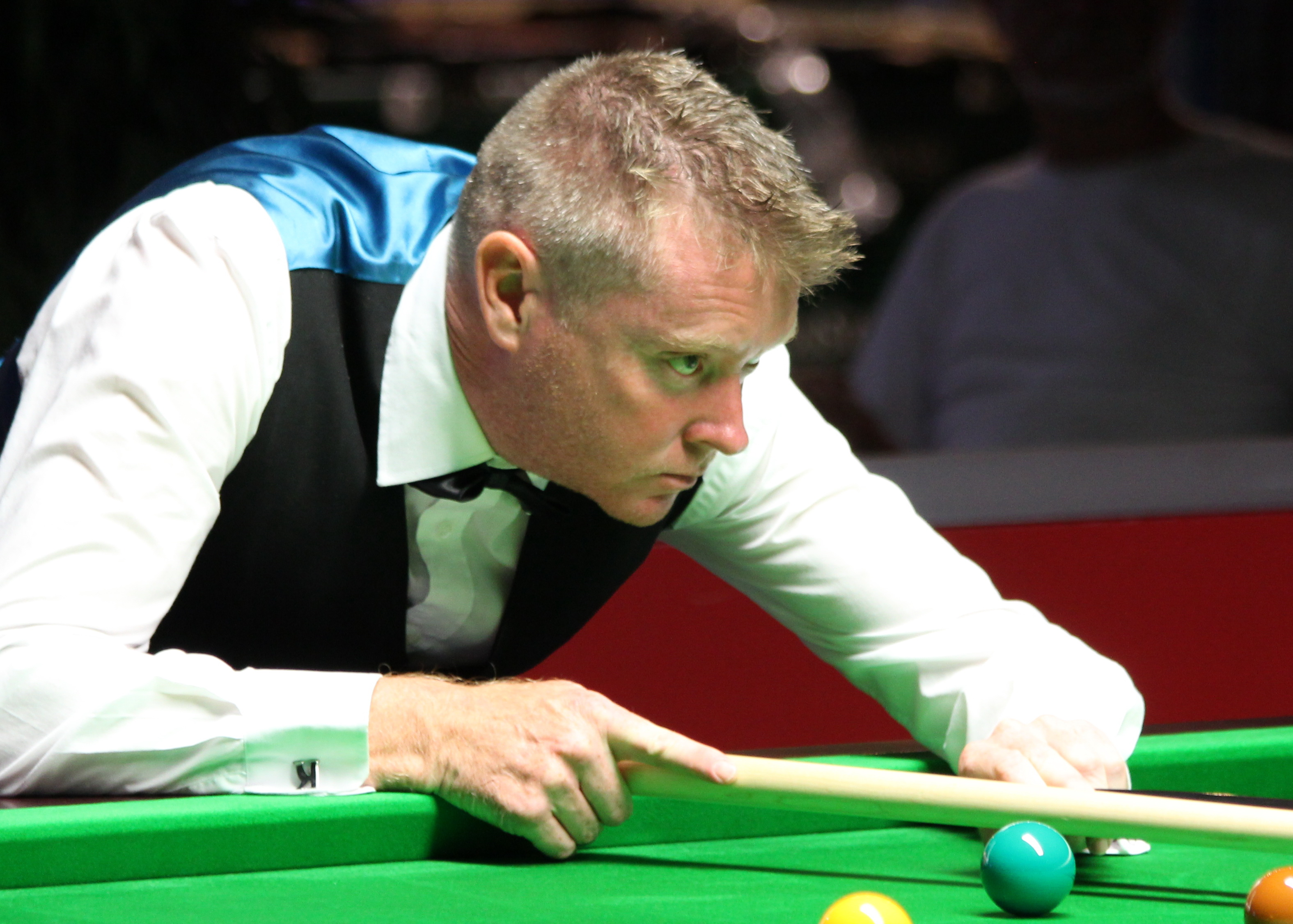 Gerard Greene beim Paul Hunter Classic 2016